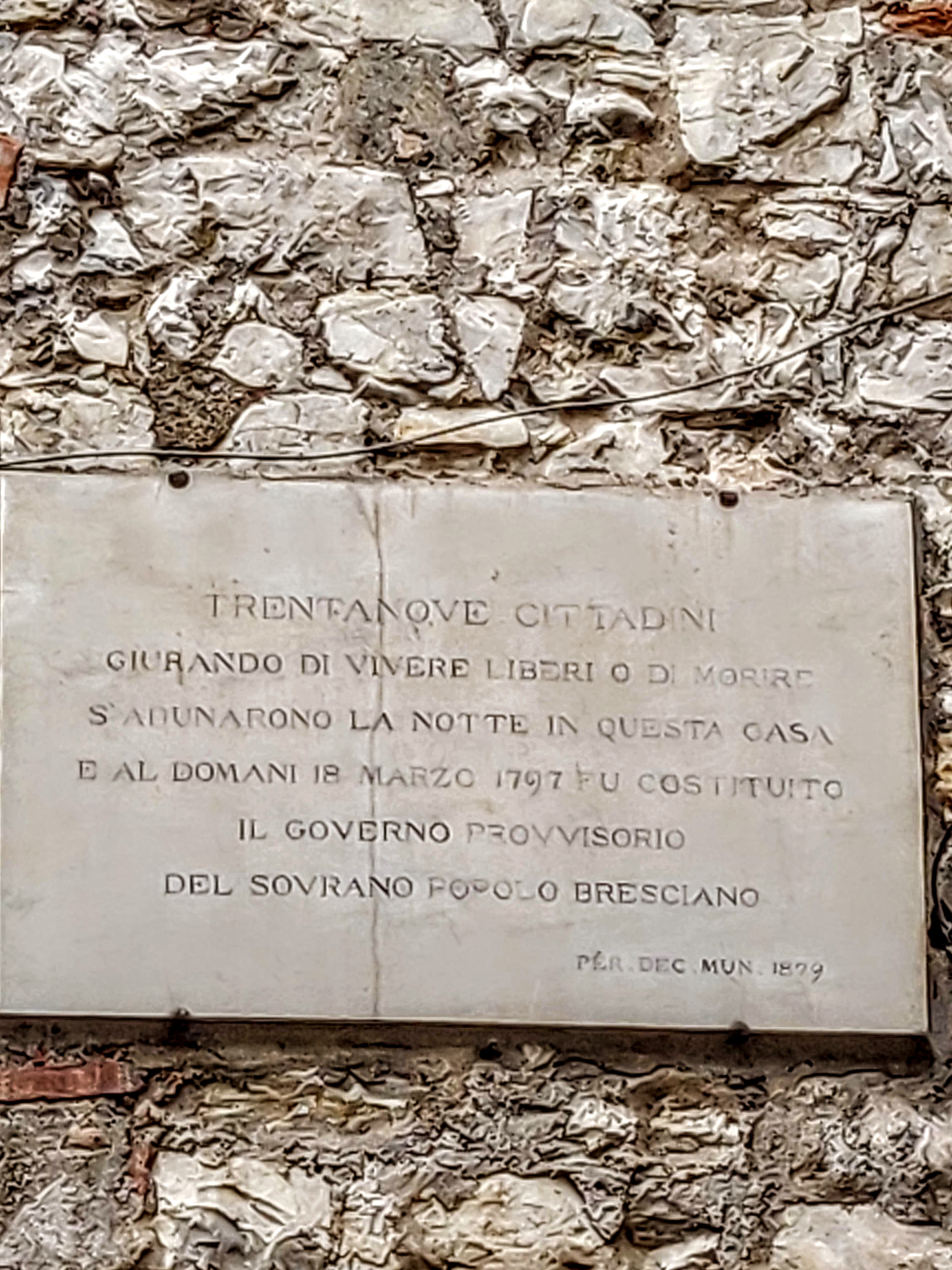 Targa commemorativa per gli eventi che portarono alla formazione della Repubblica Bresciana